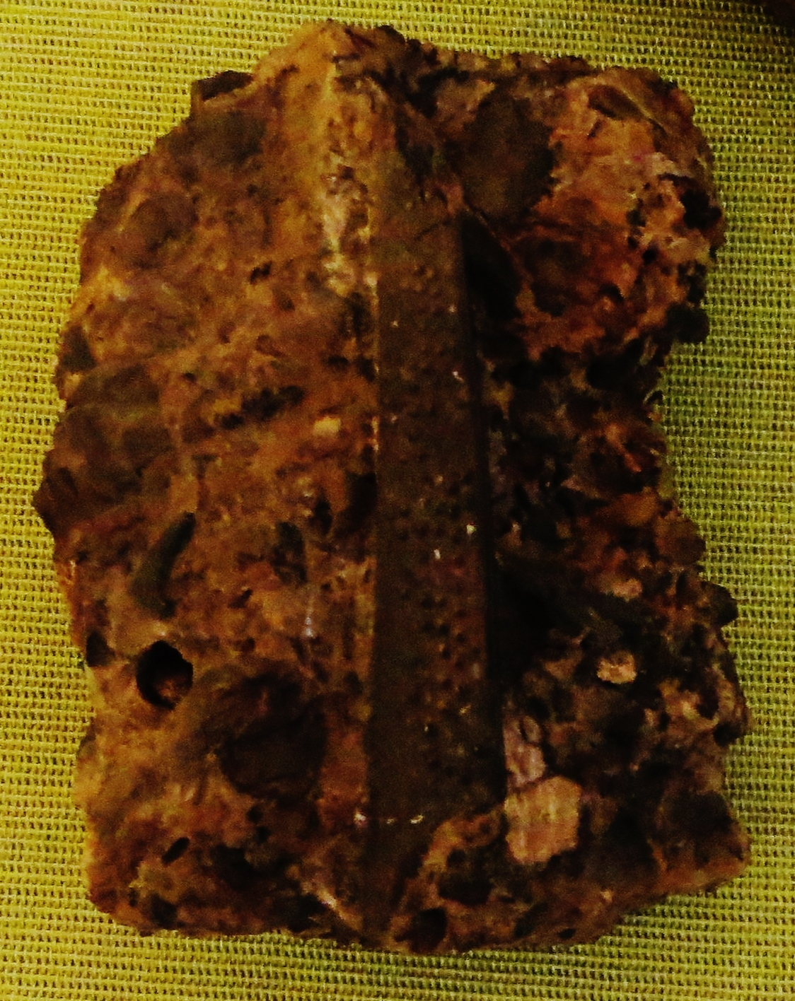 Fossil of Nemacanthus, an extinct fish- Took the picture at Museum of Paleontology, Tubingen